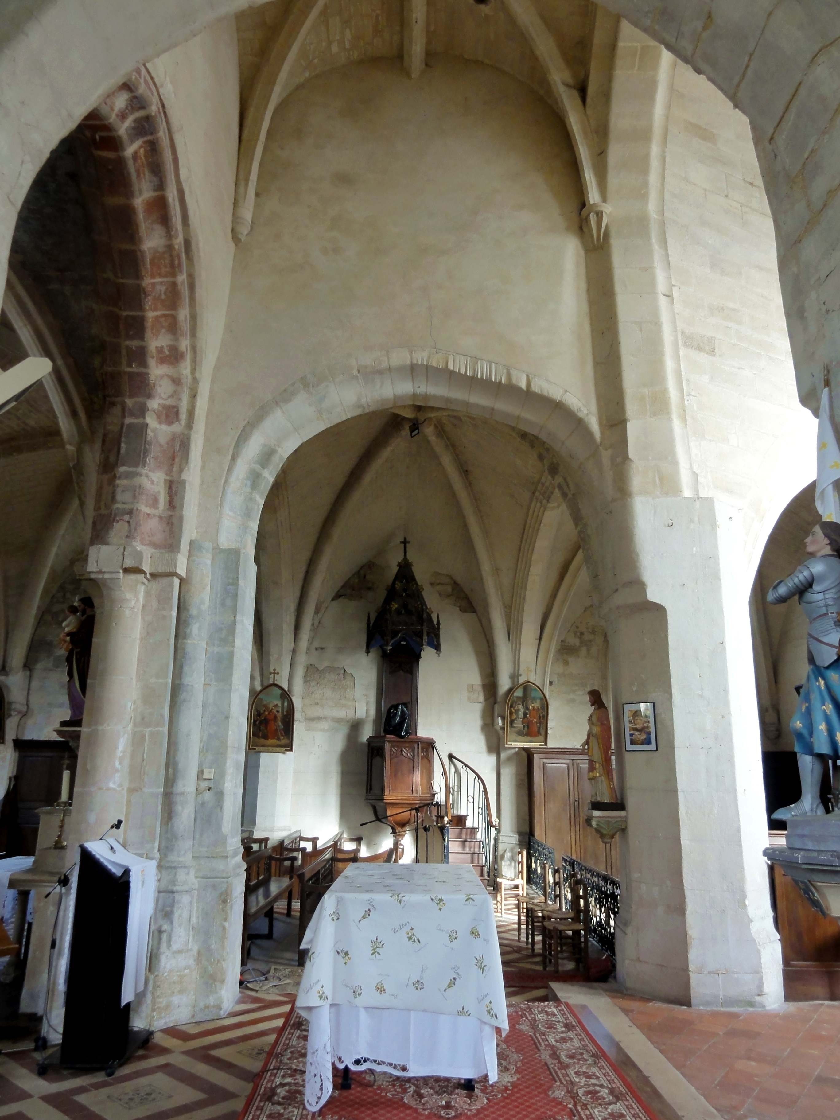 Voir titre.